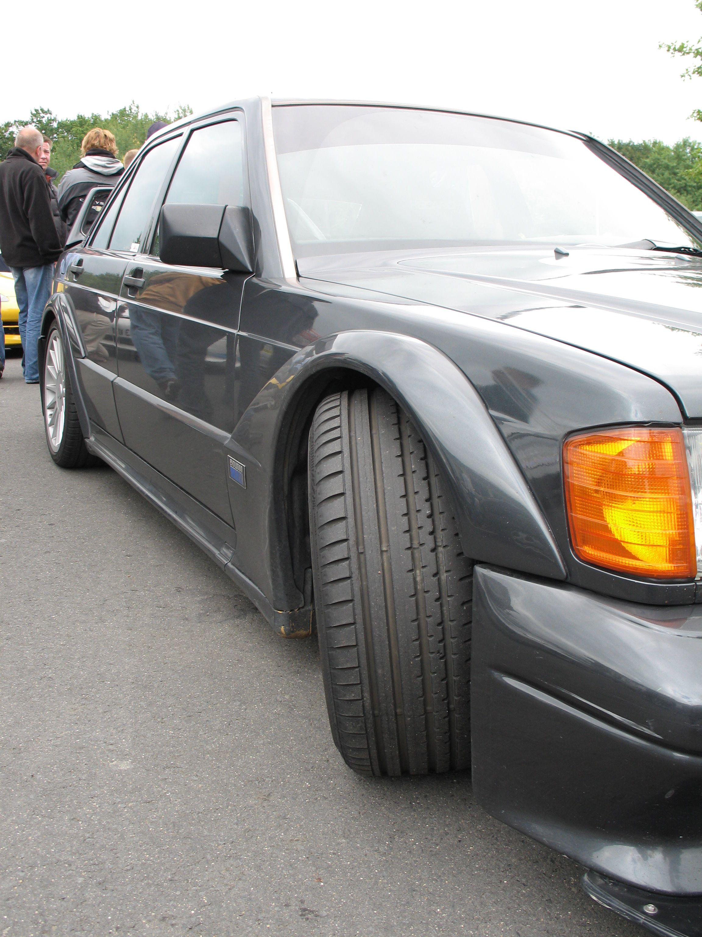 Mercedes-Benz 190 E 2.5 Evo SportlineDTM Merc